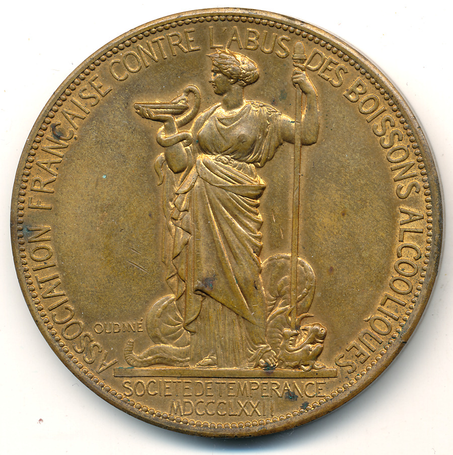 ASSOCIATION CONTRE L'ABUS DES BOISSONS ALCOOLIQUES 1872, médaille bronze 51mm, signée Oudiné, 1872